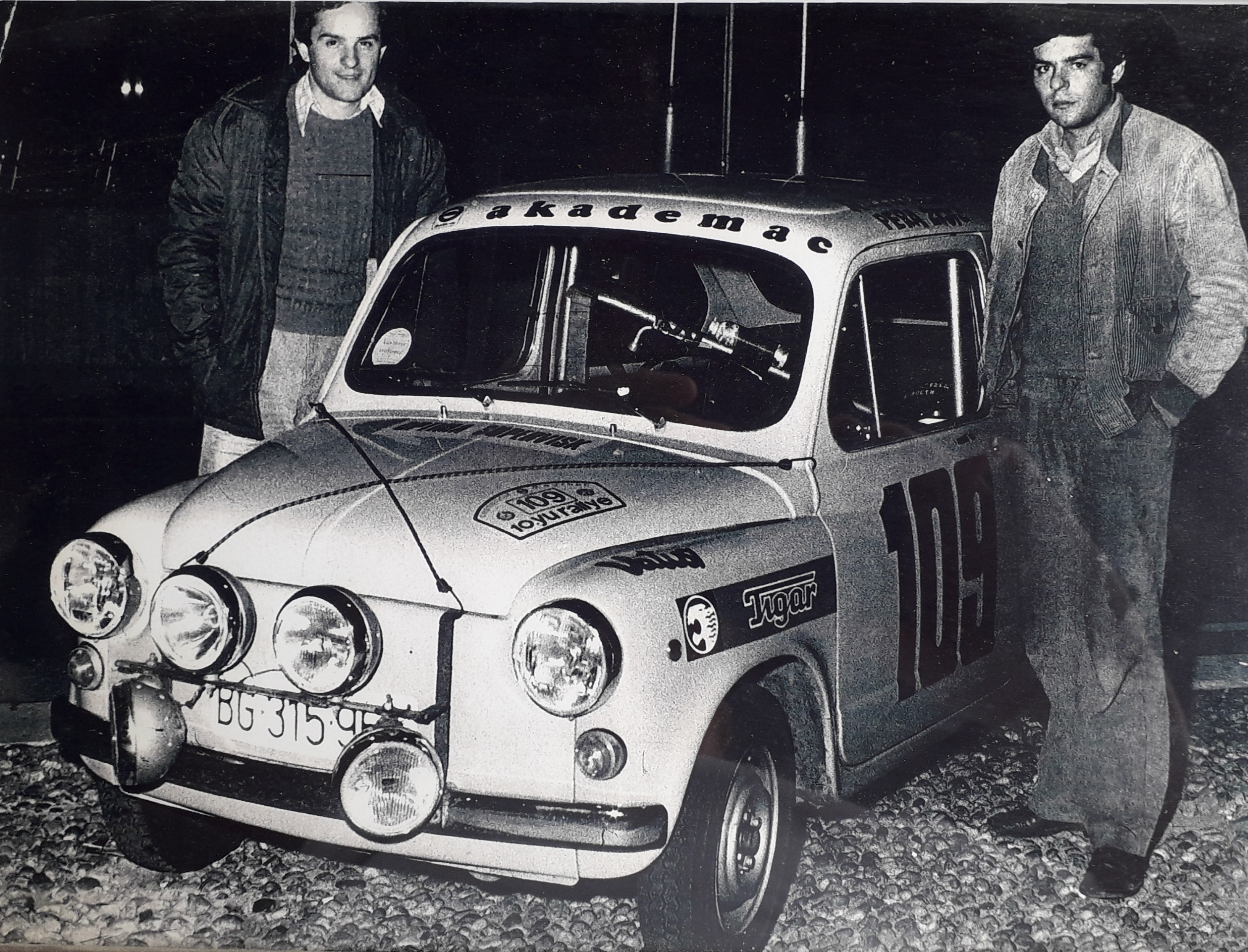 Посада Владимир Ђенић — Ђорђе Ђенић